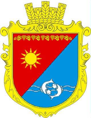 Герб села Оксамитне (Болградський район)